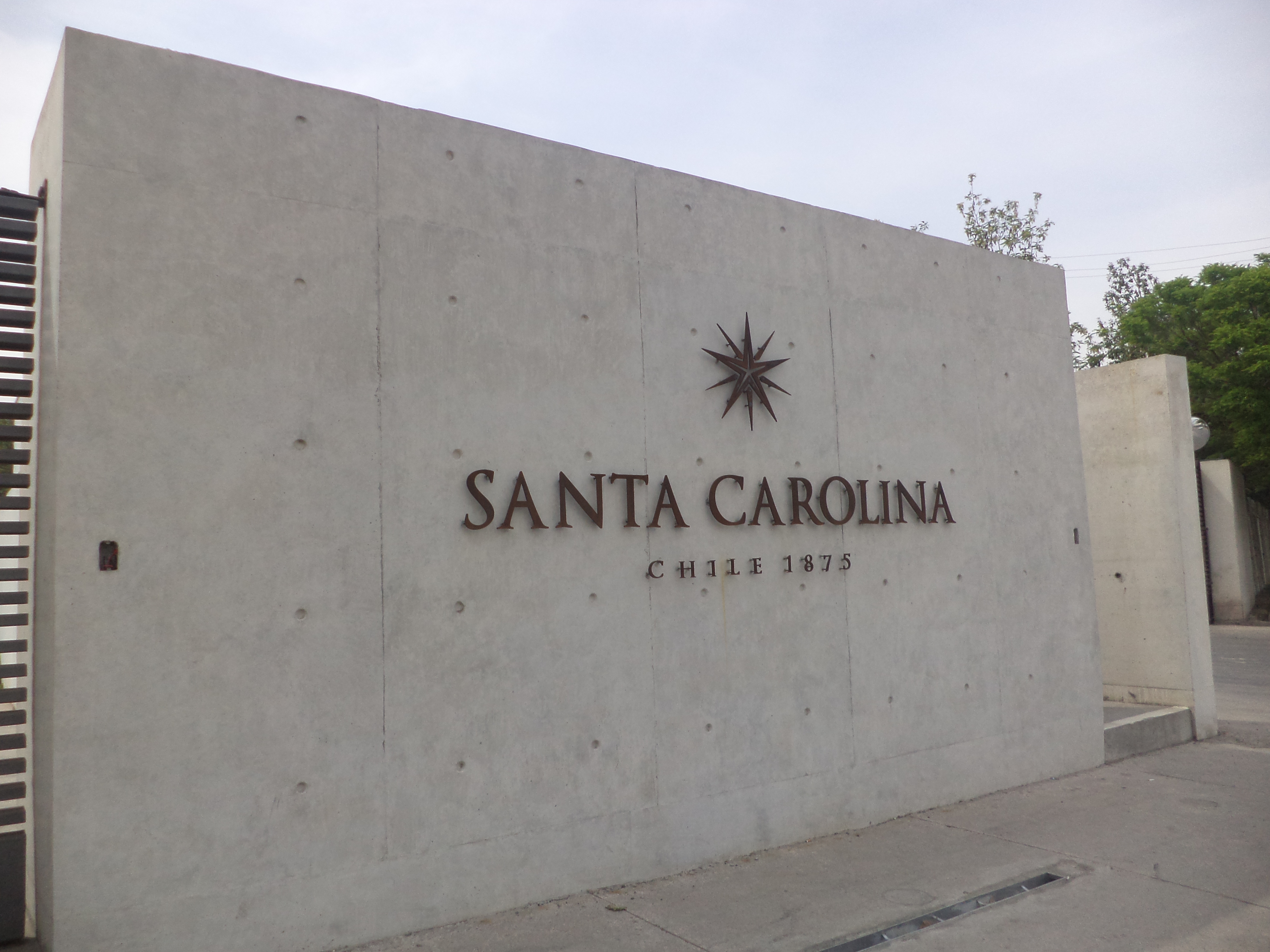 Letreros de Viña Santa Carolina en Santiago de Chile. Letrero nuevo en la zona de las bodegas actuales.